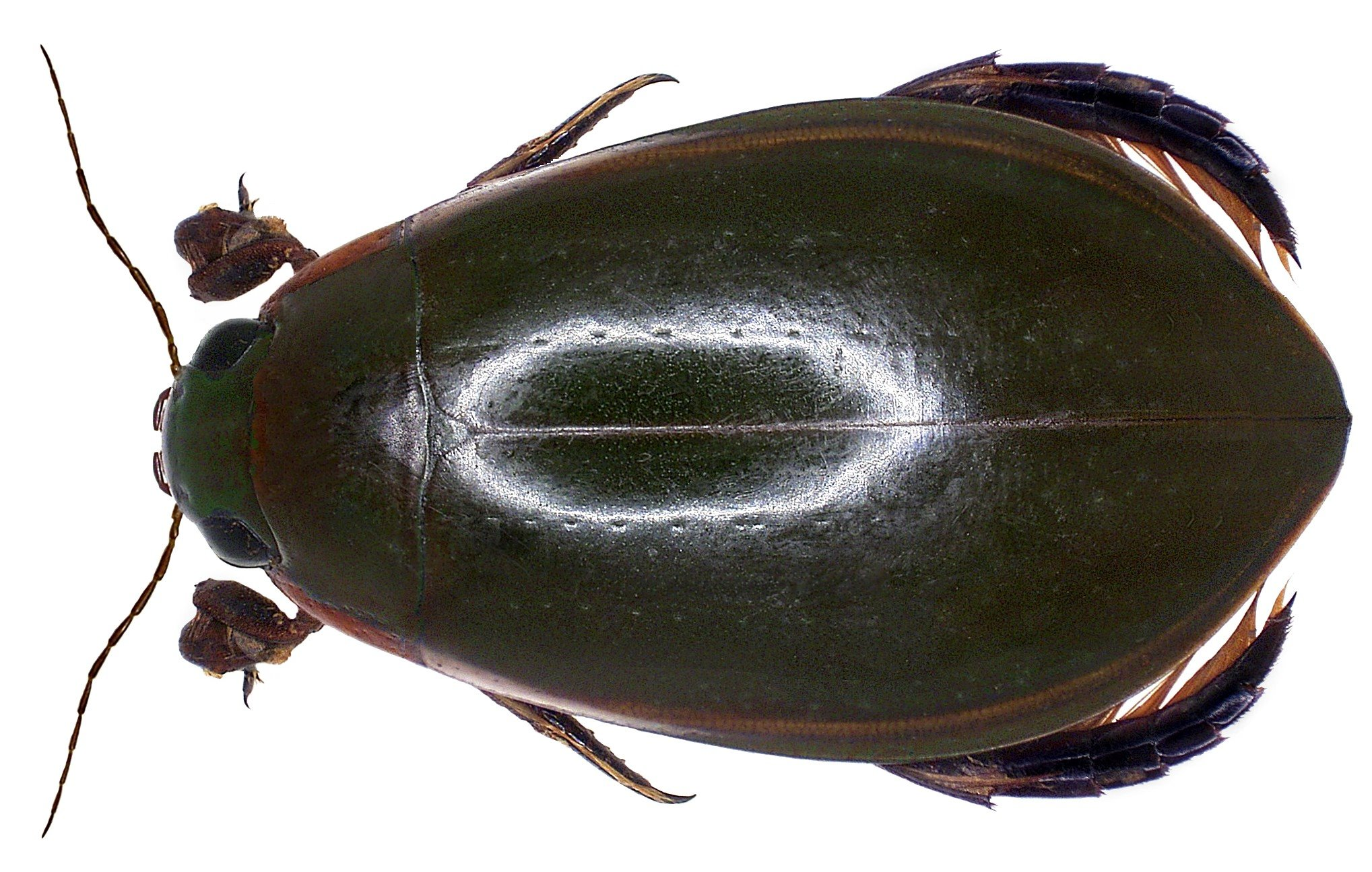 Cybister lateralimarginalis (DeGeer, 1774) male Familie: Dytiscidae Grösse: 30-37 mm Verbreitung: Mittelmeergebiet über Kleinasien bis Sibirien und die Mongolei Fundort: Jugoslavien, Skutari-See leg. det. U.Schmidt, 1982 Foto: U.Schmidt, 2008